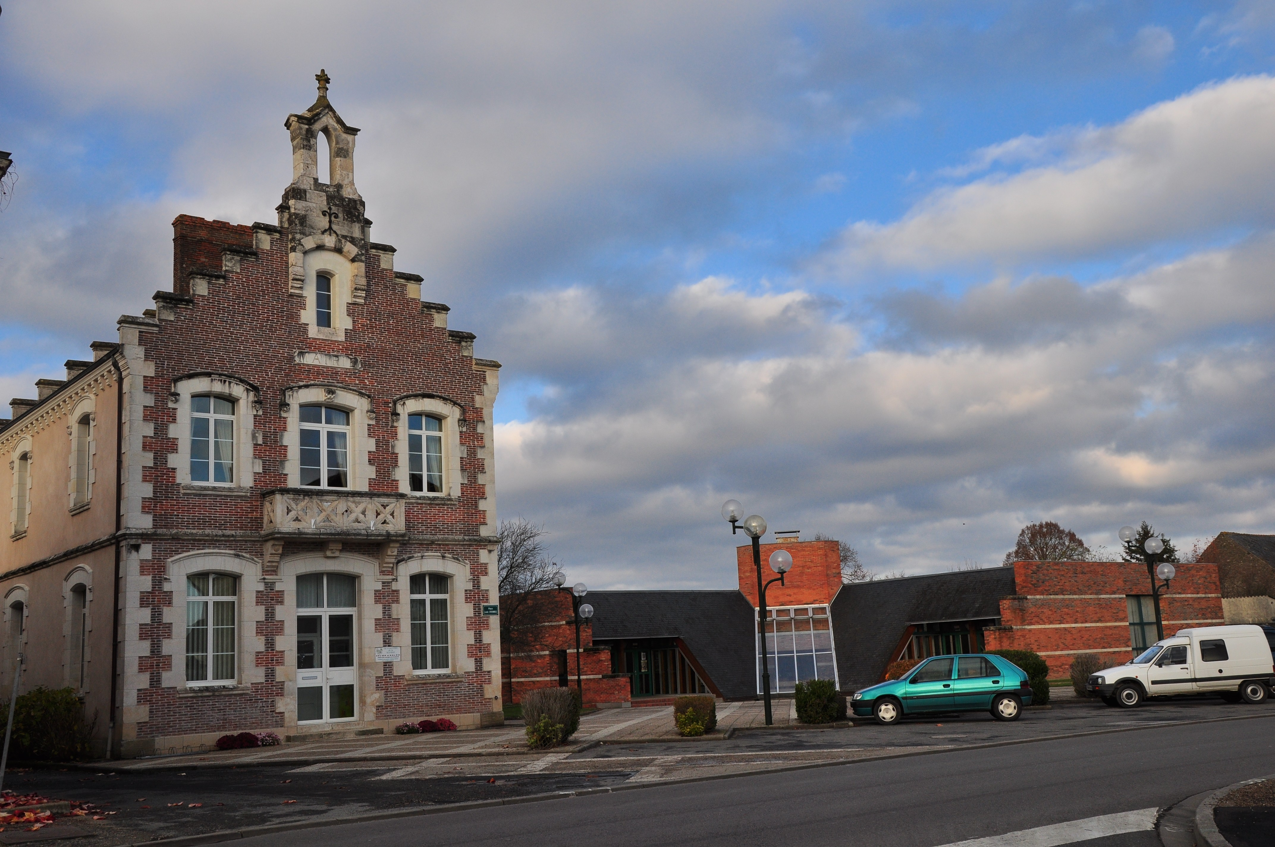 Vendœuvres (Indre) - Mairie